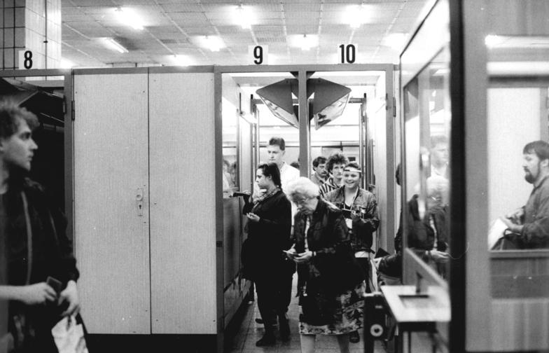 ADN-Franke-3.4.90-Berlin-Grenzkontrolle für Einreisende in die DDR am Bahnhof Friedrichstraße. Die Abfertigung der Reisenden geht zügig vonstatten. Über den Kontrollpunkt Friedrichstraße reist ein großer Teil der nichtmotorisierten Fahrgäste nach Westberlin und zurück.